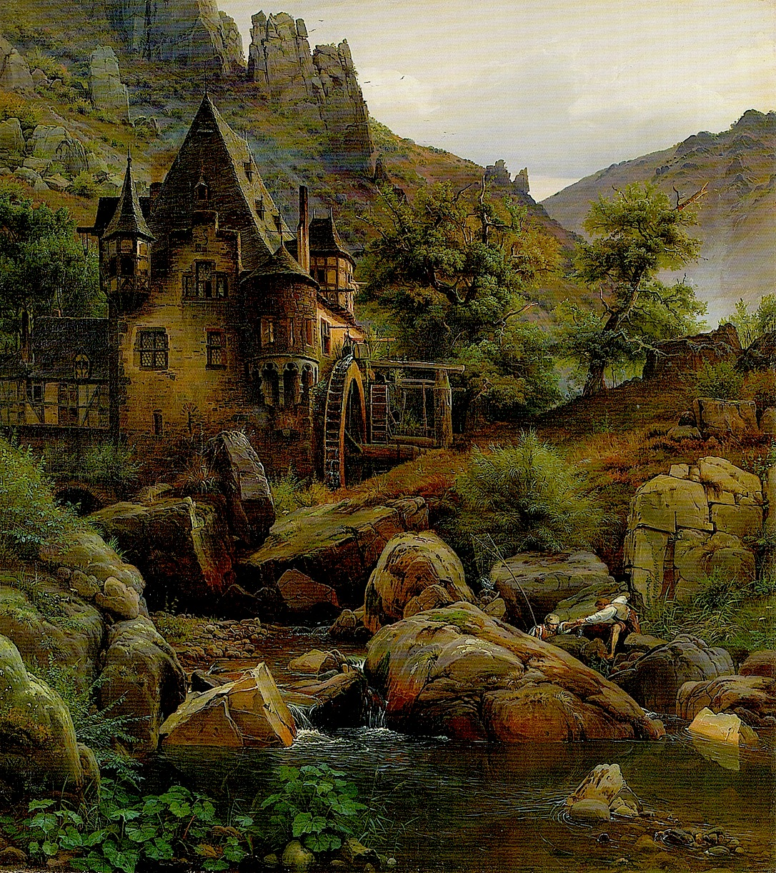 Картина пейзажиста Вильгельма Позе "Ландшафт с мельницей в долине Моргенбах". Дюссельдорфская художественная школа.